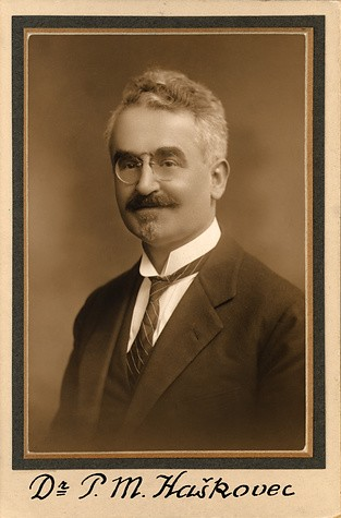 Prokop Miroslav Haškovec (1876 - 1935), Český literární historik, profesor a překladatel.